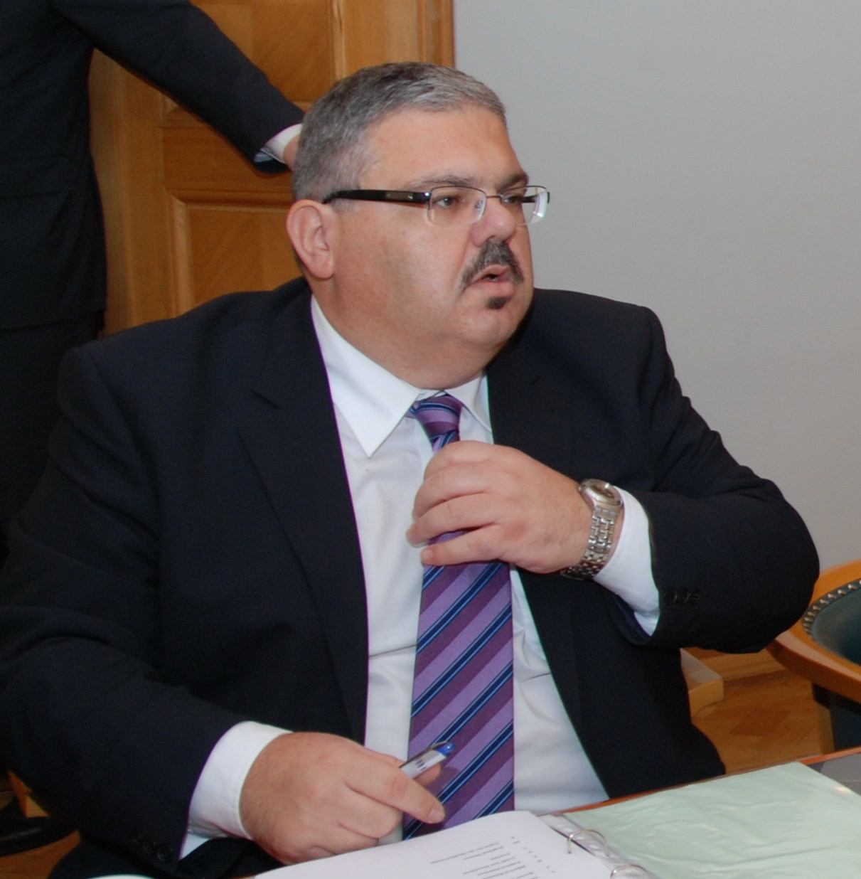 Maltas premjerministrs Lorenss Gondzi (otrais no kreisās), Maltas dabas resursu un lauku jautājumu ministrs George Pullicino (pirmais no kreisās), premjerministra Sekretariāta vadītājs Edgar Galea Curmi (otrais no labās), Maltas valdības Komunikācijas departamenta vadītājs Gordon Pisani (pirmais no labās)